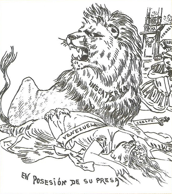 "Dibujo que representa la ambición por parte de Inglaterra por reclamar porciones del territorio venezolano"